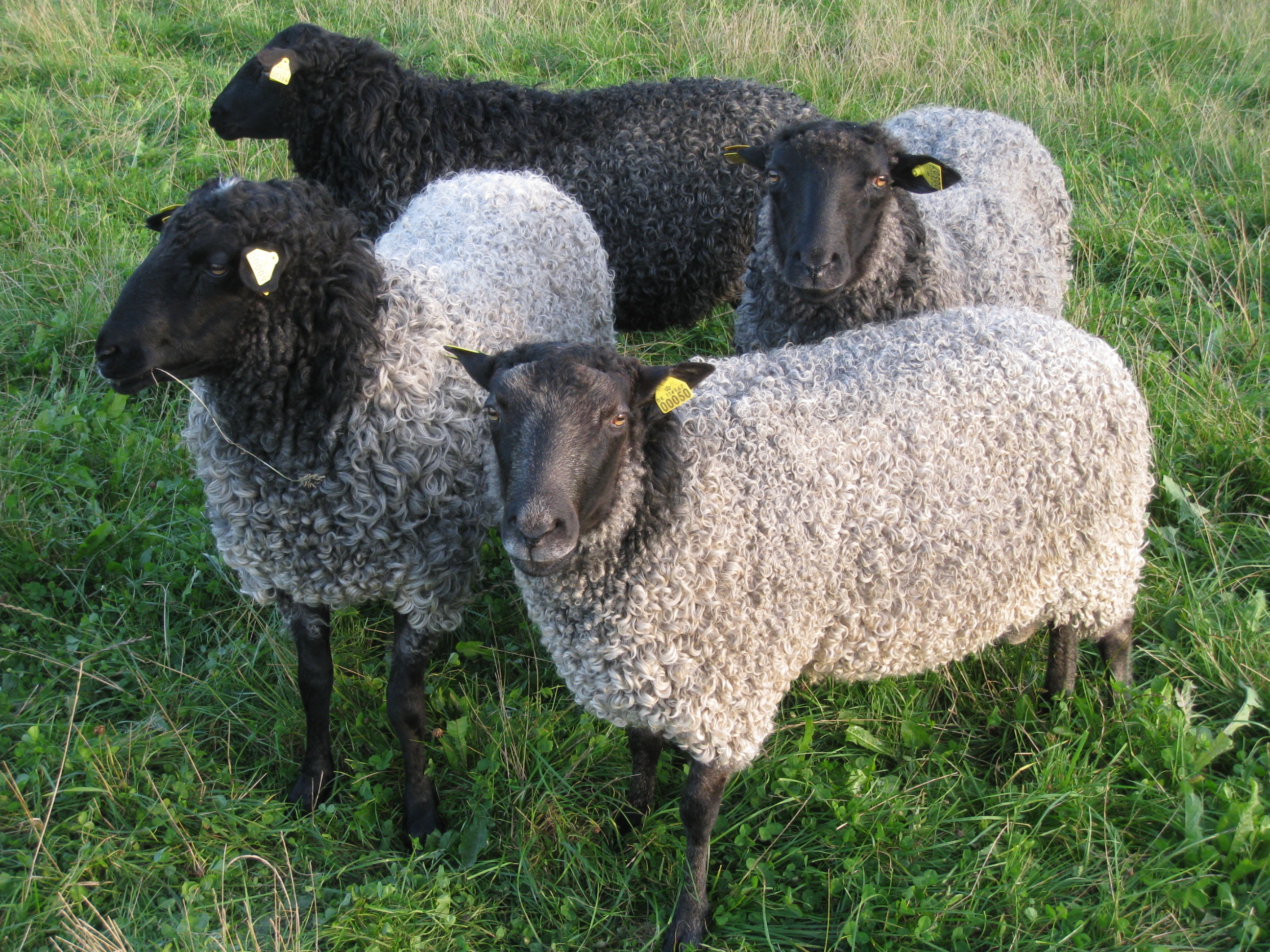 A small group of Gotland rams in September